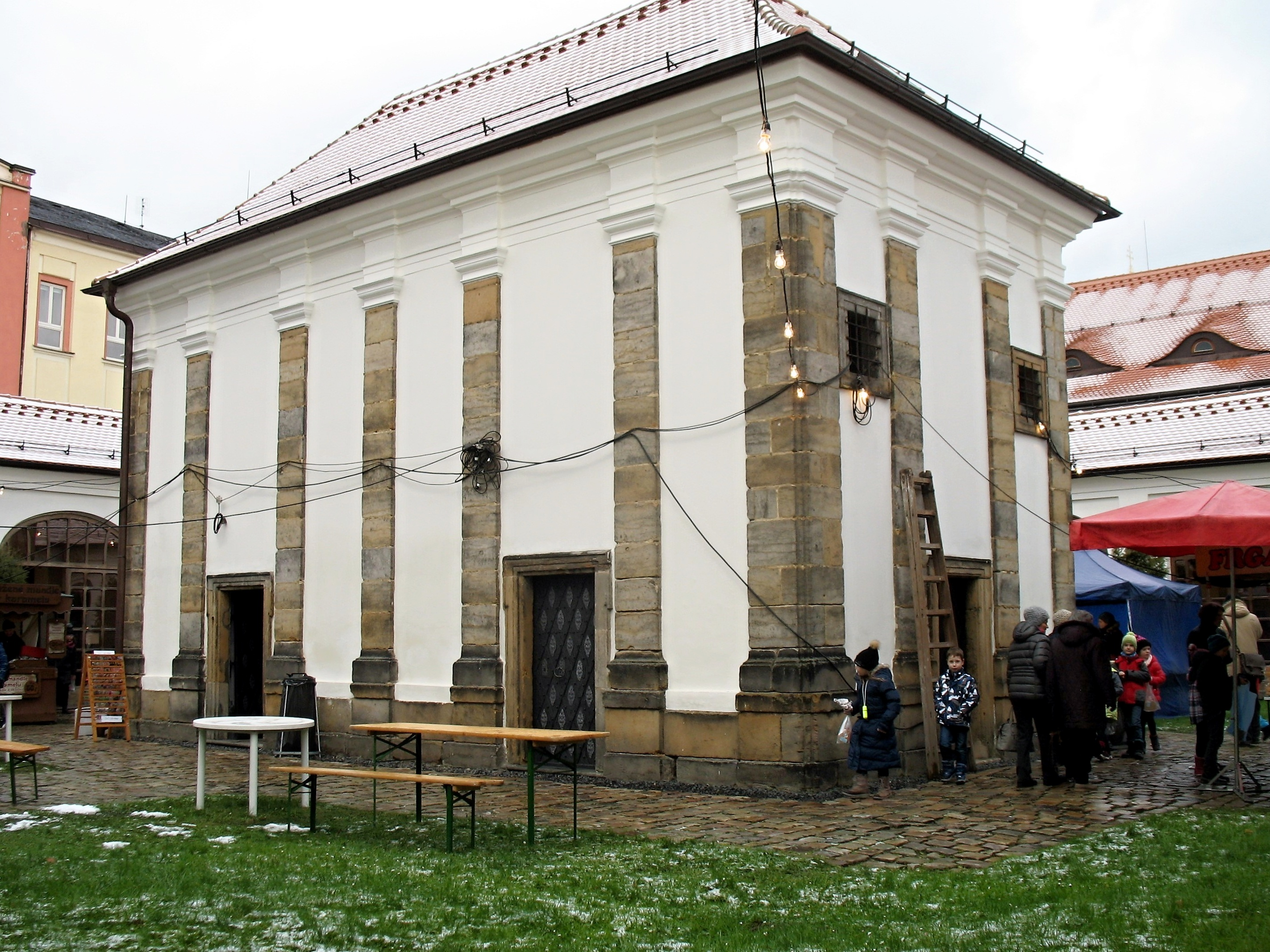 Loreta v areálu augustiniánského kláštera v České Lípě je součástí tradičních vánočních trhů